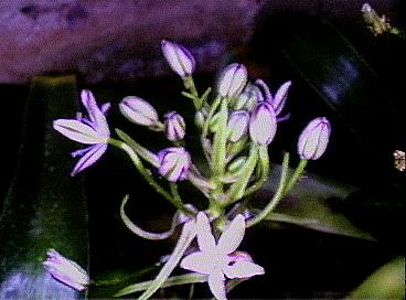 Sicilian botanical endemisms Scilla peruviana (Scilla cupani Guss.)